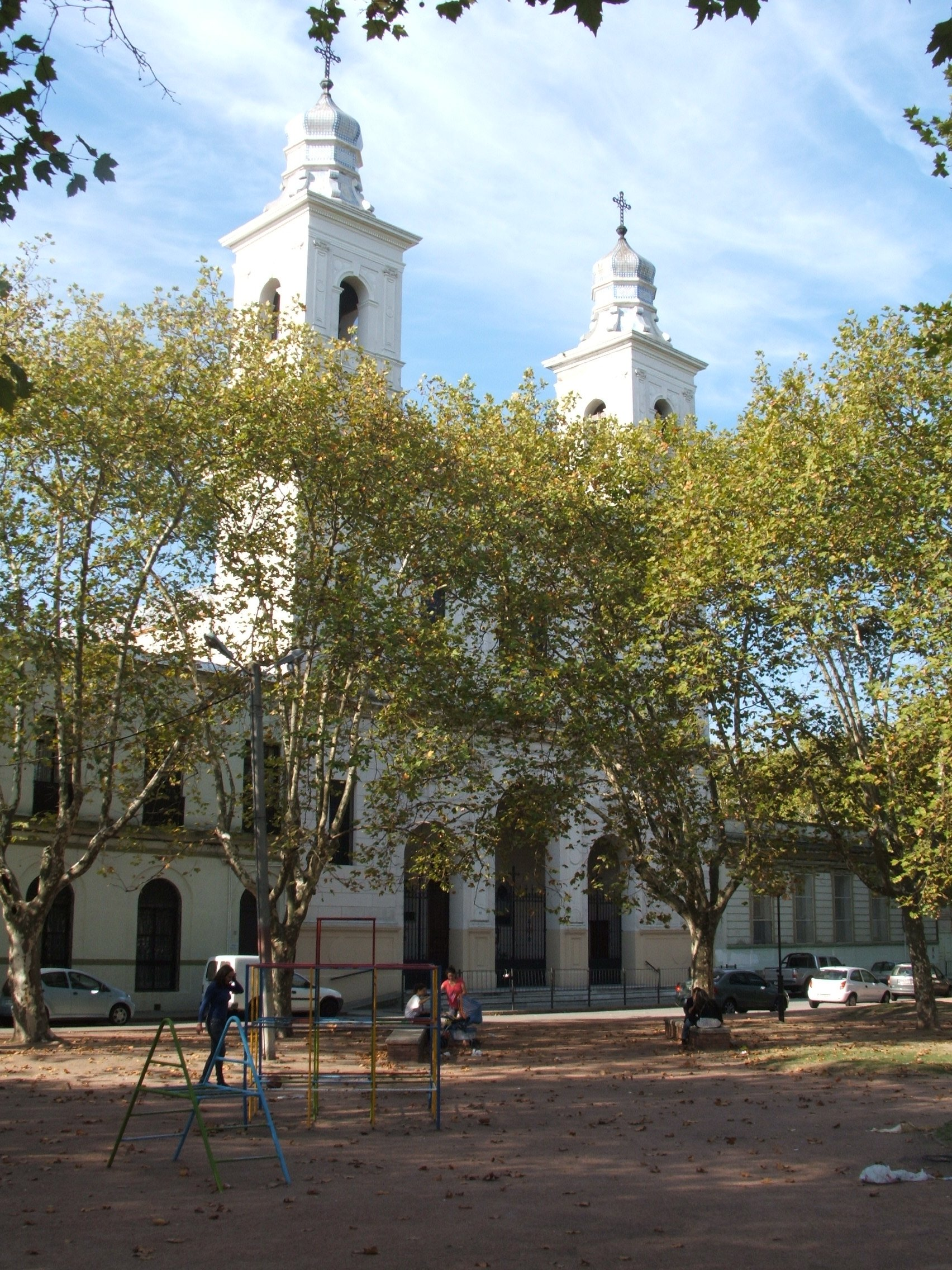 Iglesia de Nuestra Señora de los Dolores ("Iglesia del Reducto"), vista lateral desde la plaza Cardenal Barbieri.